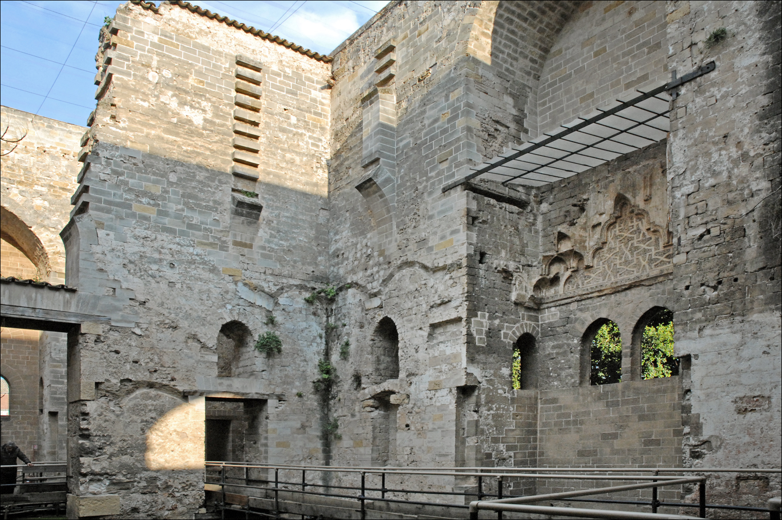 La Cuba était une des résidences, situées en dehors de la ville dans le parc royal appelé Génoarde, construites par les souverains normands de Sicile et destinées à leurs loisirs. La Cuba date de 1180. C'est un édifice rectangulaire initialement orné d'une coupole qui a disparu. Le bâtiment était entouré d'un grand lac artificiel appelé la Peschiara. A l'intérieur, l'espace central avait en son centre une vasque d'où coulait l'eau vers le bassin extérieur. L'intérieur décoré dans le style arabe disposait de voutes à encorbellement en stalactiques (mouqarnas). Comme pour d'autres résidences arabo-normandes, la façade est ornée de grandes arcatures, sans fenêtres. La façade se termine par une frise épigraphique en caractères coufiques indiquant le nom du roi Guillaume II et la date de construction. Article de Wikipedia sur la Cuba